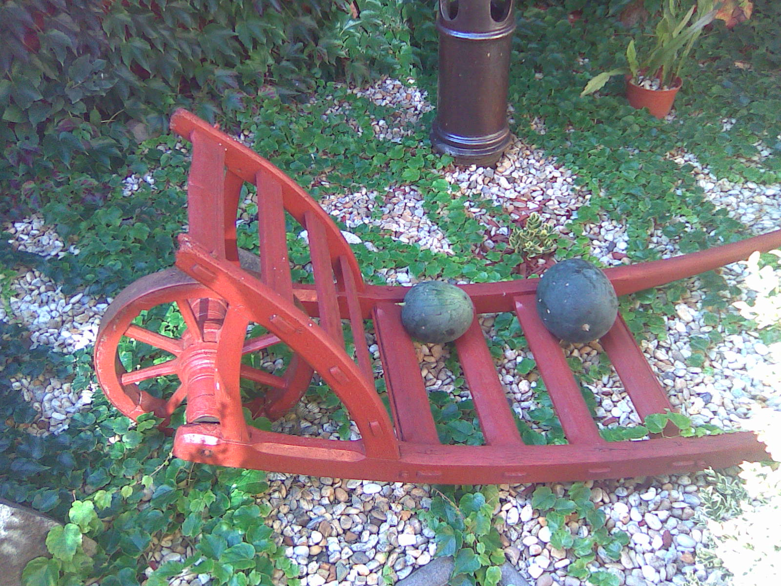 Tragač